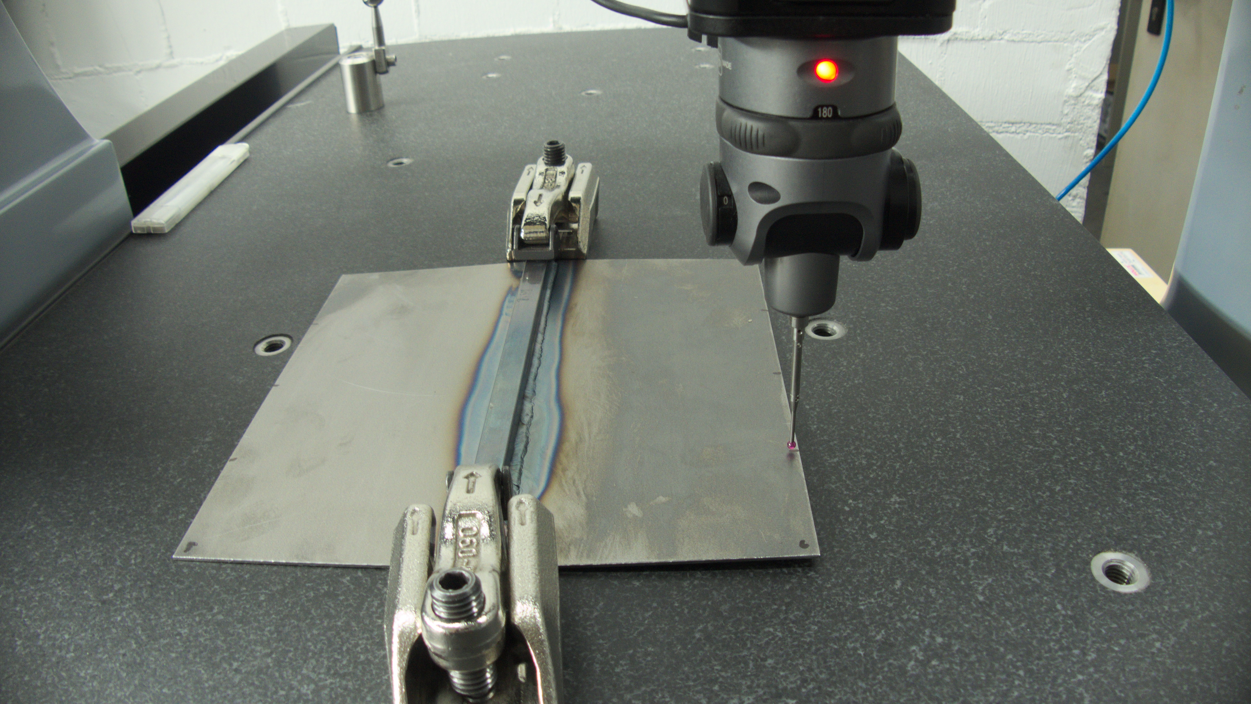 Studentische Projektarbeit für die Werkstoffkunde TH Köln - Campus Gummersbach